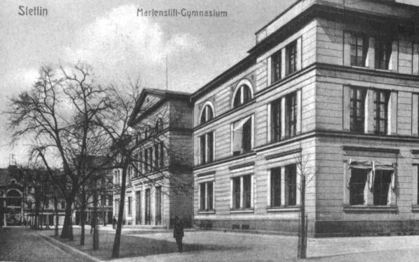 Gimnazjum Mariackie, dzisiaj LO9